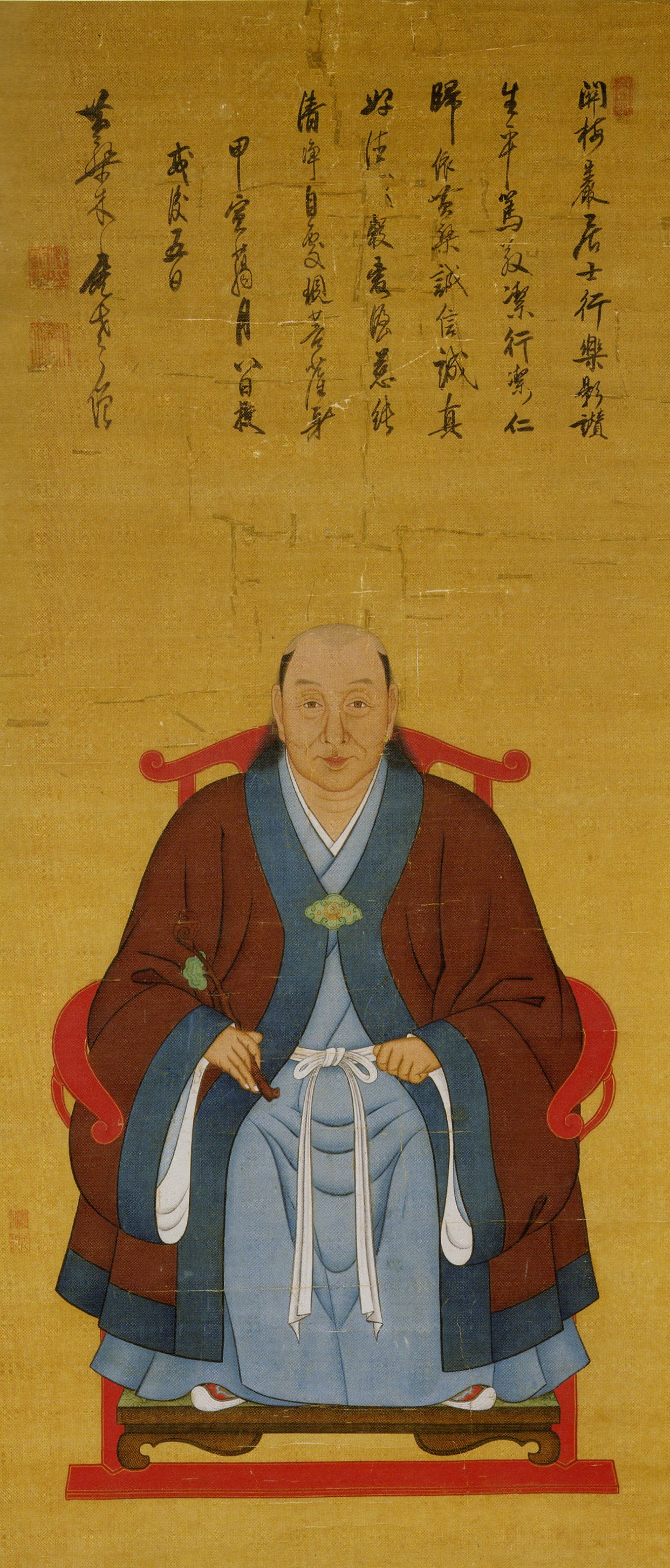 関長政の肖像。